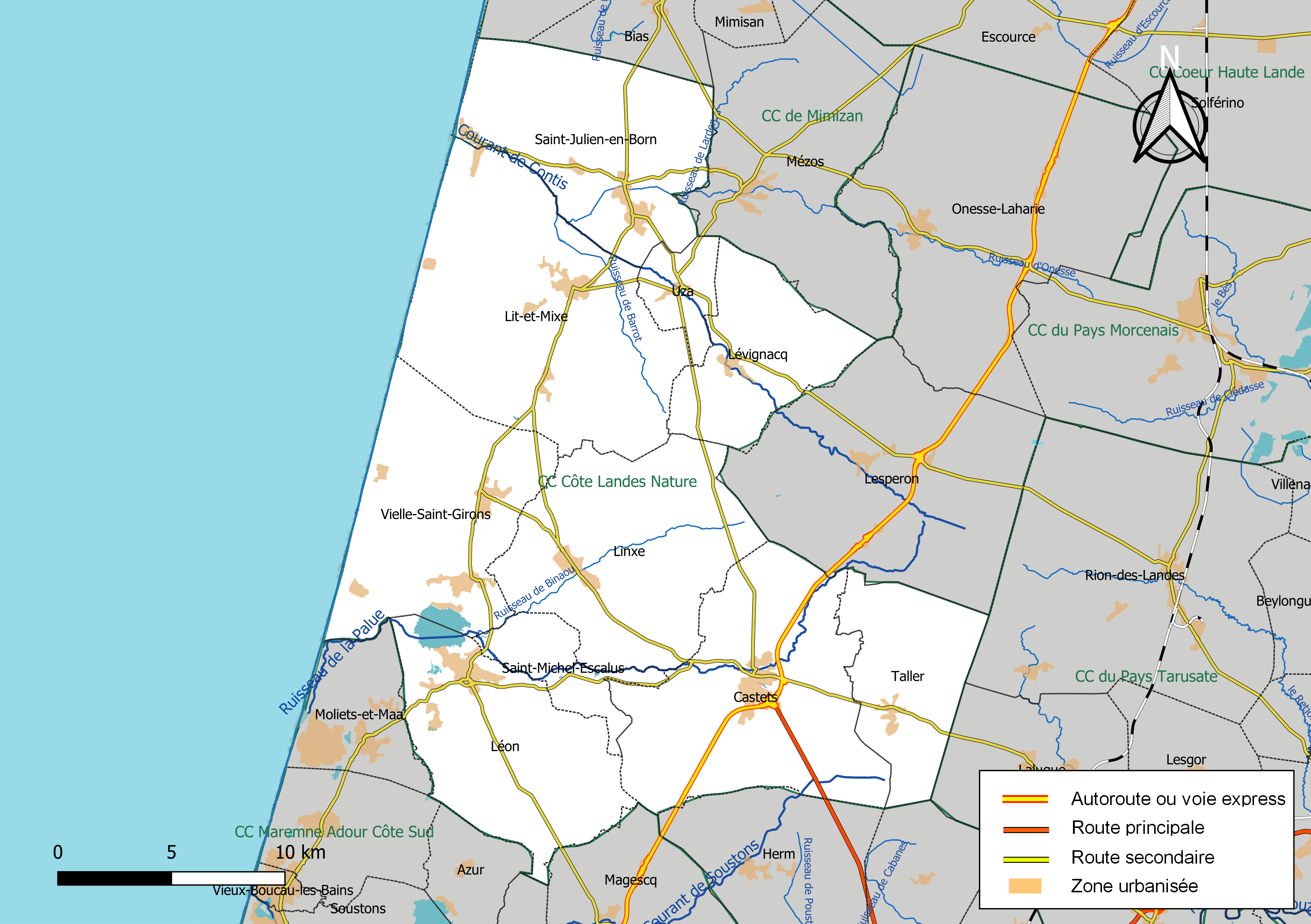 Carte géographique de la Communauté de communes Côte Landes Nature, département des Landes, France. Composition au 1er janvier 2019.